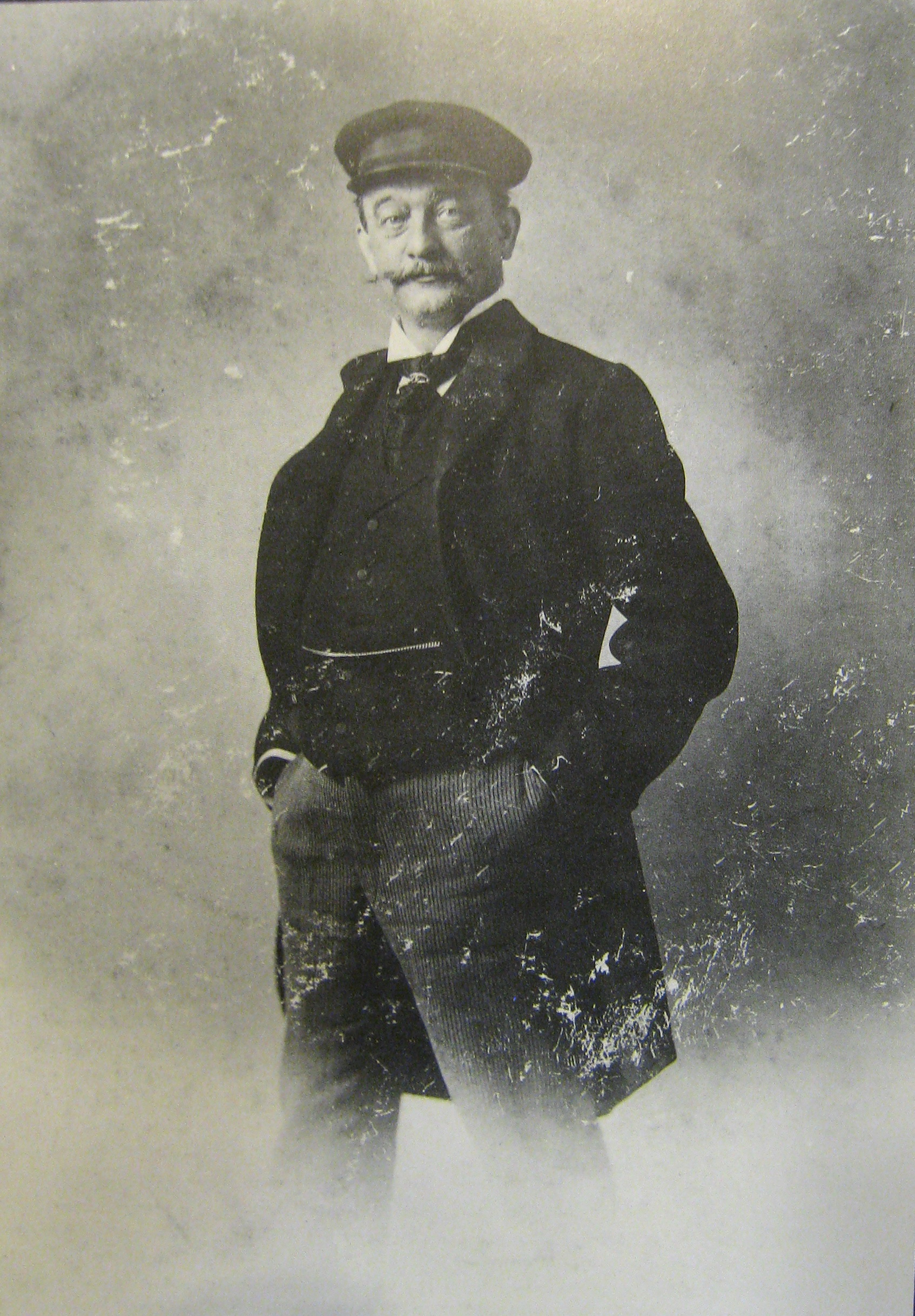 Autoretrat de Pau Audouard de l'època en que tenia el seu taller a la casa Lleó Morera del passeig de Gràcia de Barcelona.